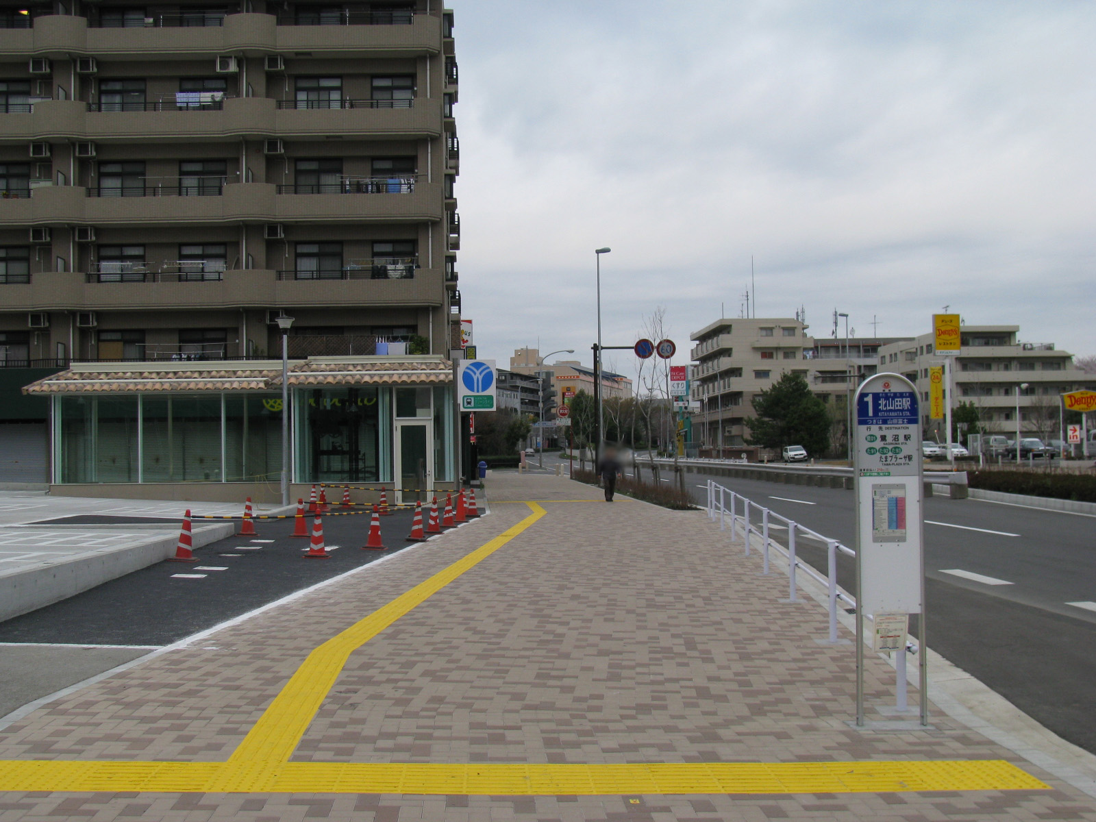 横浜市営地下鉄グリーンライン北山田駅